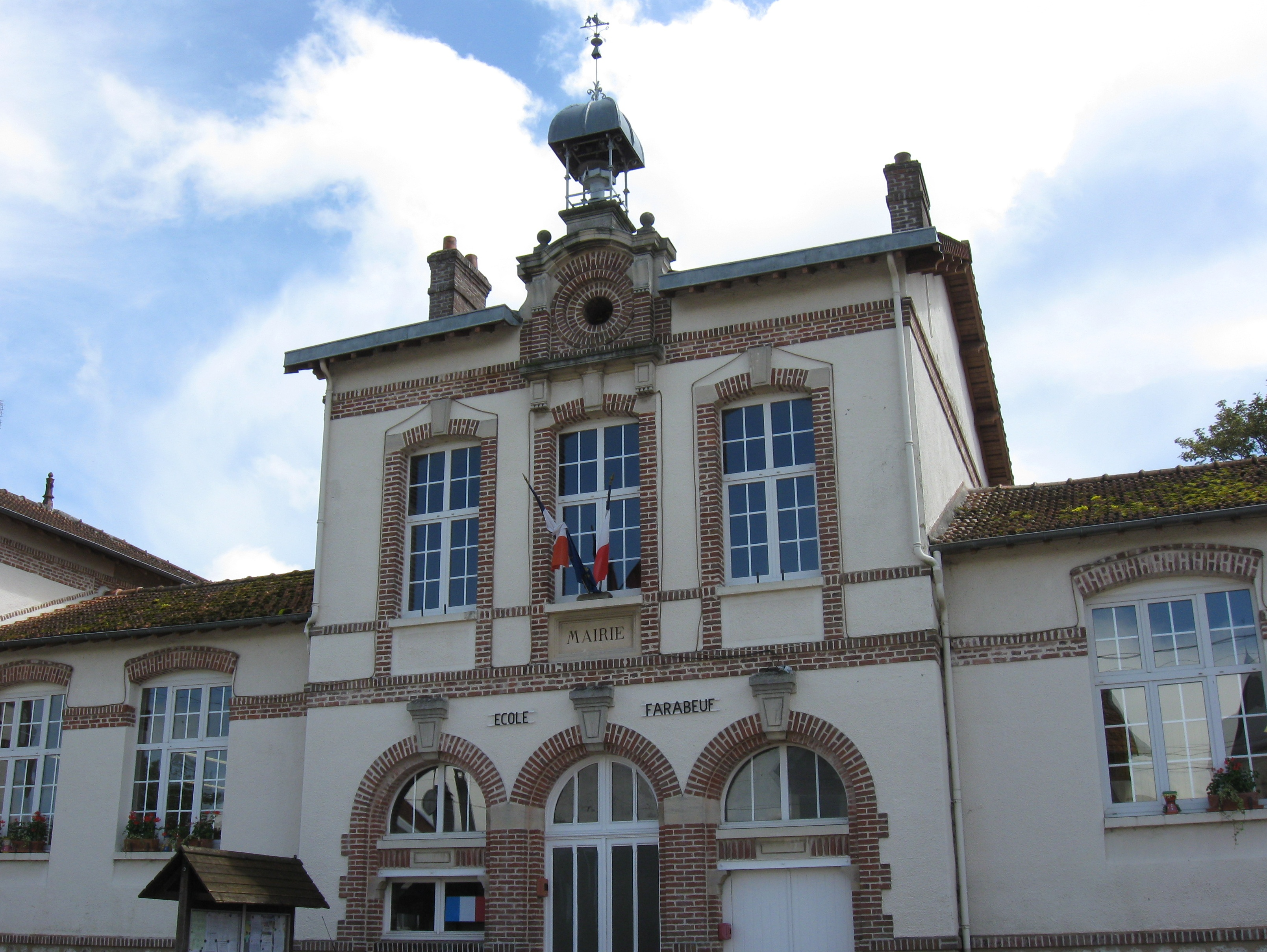 Mairie-école de Beton-Bazoches. (Seine-et-Marne, région Île-de-France).